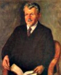 Adolf Zdrazila – autoportrét